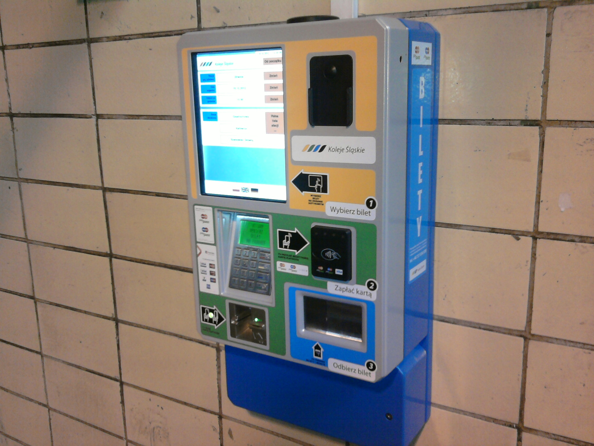 Automat biletowy pod peronem nr 1 na dworcu w Gliwicach